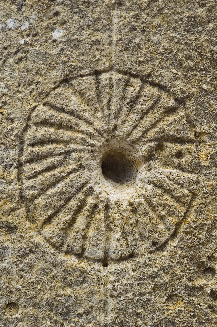 Rueda solar en la fachada meridional de la Igesia de San Esteban en Moradillo de Sedano, Burgos (España), gótico sXII